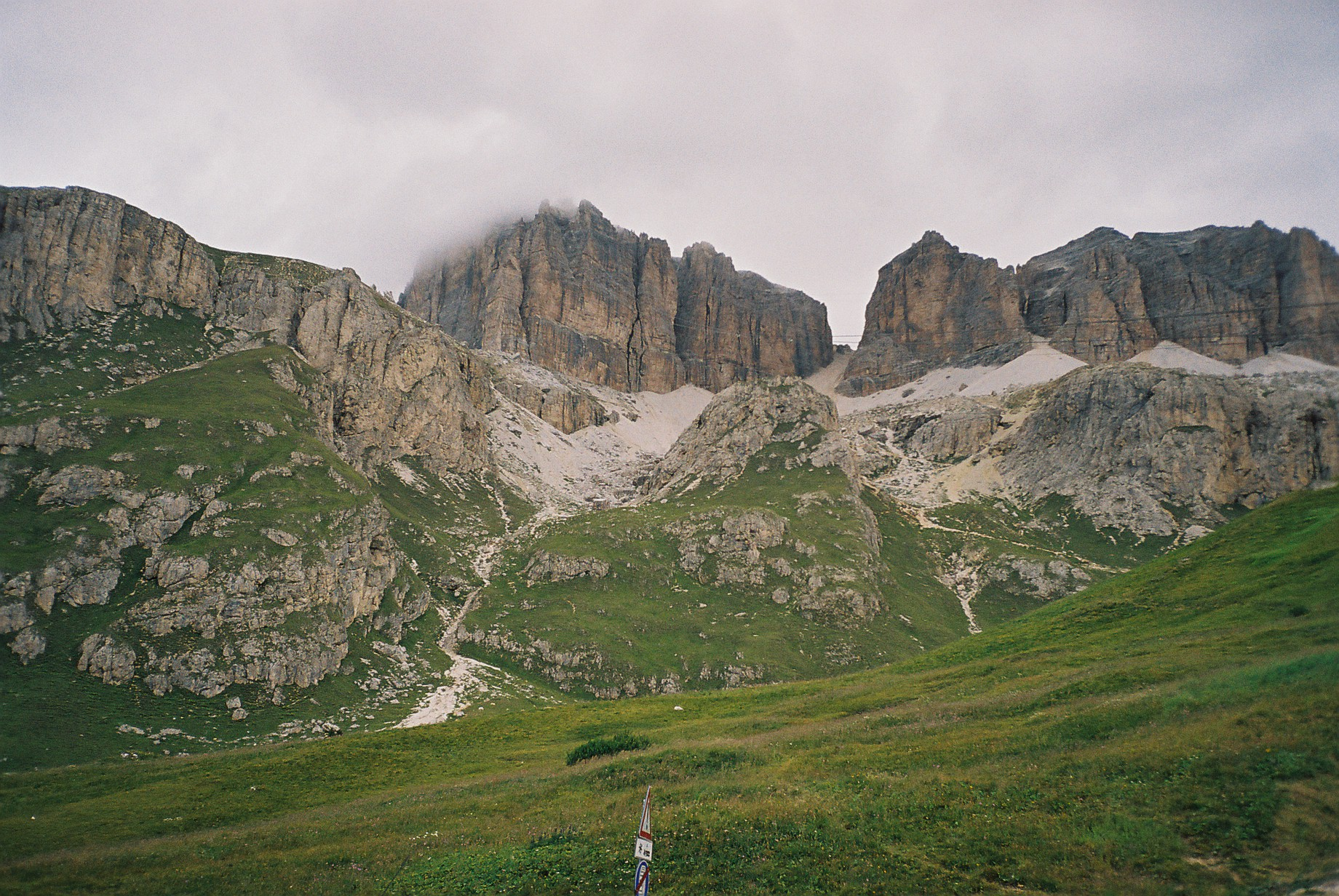 Landschap vanop de Pordoipas. Eigen werk, vrij voor het publiek. Uploading n.a.v. artikel Pordoipas.